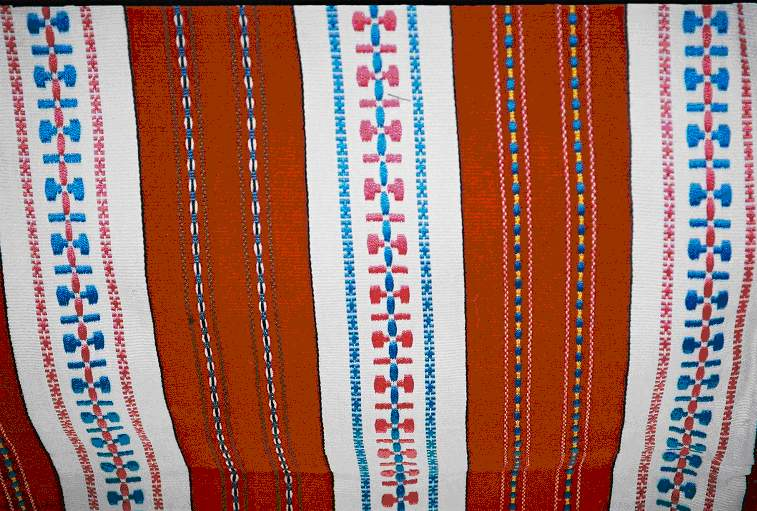 Rusinski vez